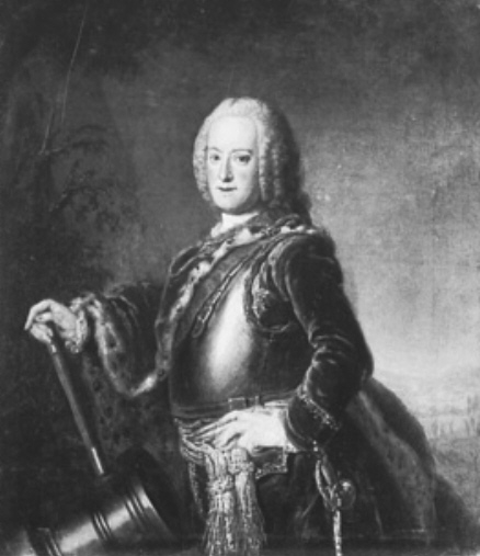 Samuel von Schmettau (* 24. März 1684; † 18. August 1751), preußischer Generalfeldmarschall. Posthumes Porträt.